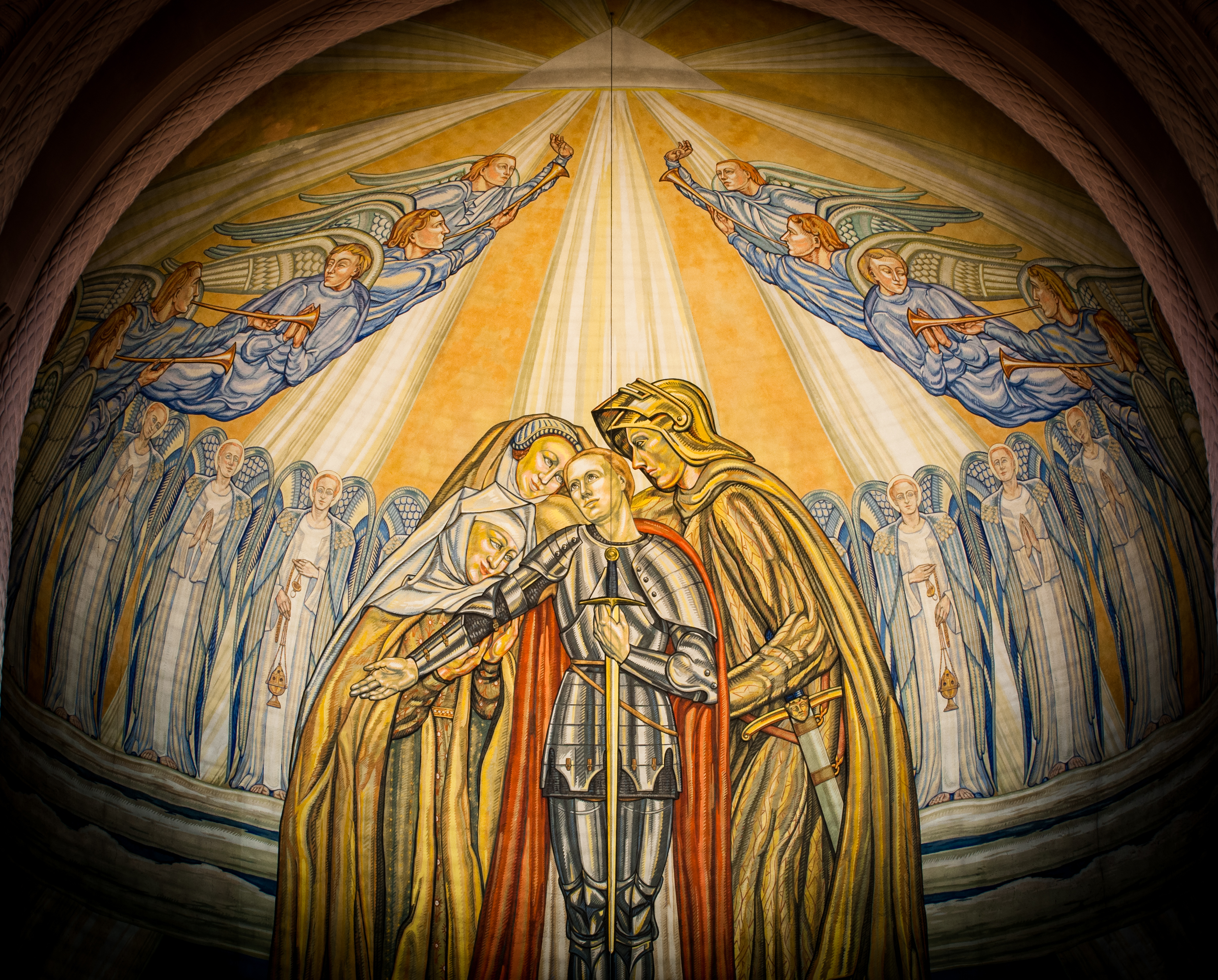 Détail de la fresque en l'église Ste Jeanne d'Arc de Versailles (78)